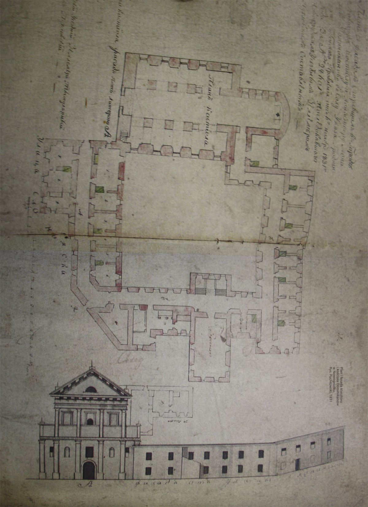 Беларуская (тарашкевіца): Наваградак (Navahradak), рог пляцу Рынку (plac Rynak) і вуліцы Слонімская (vulica Słonimskaja). Касьцёл Сьвятога Міхала Арханёла і кляштар дамініканаў. Абмеры